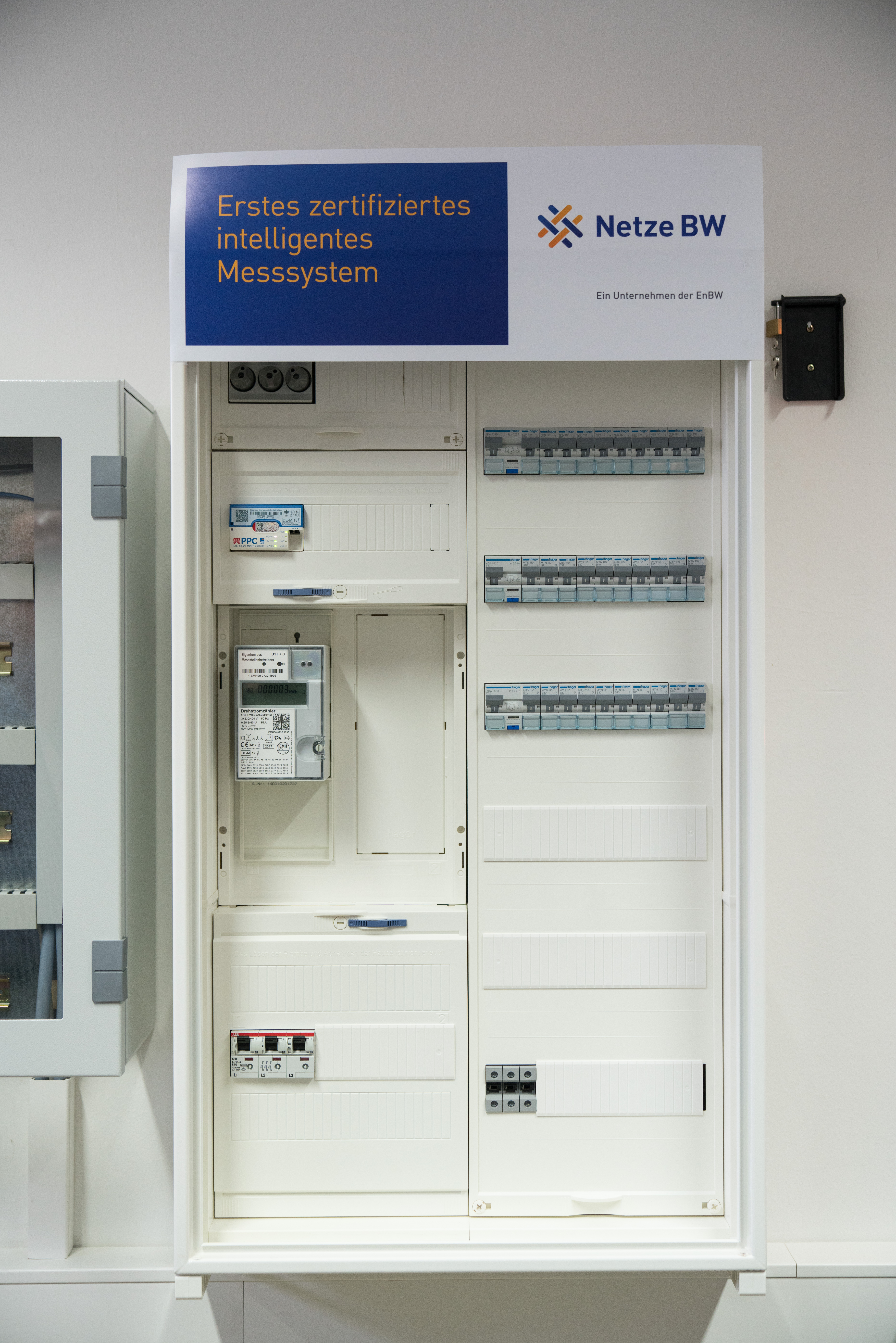 Einbau eines zertifizierten Smart Meter Gateway im Zählerlabor der Netze BW, Karlsruhe